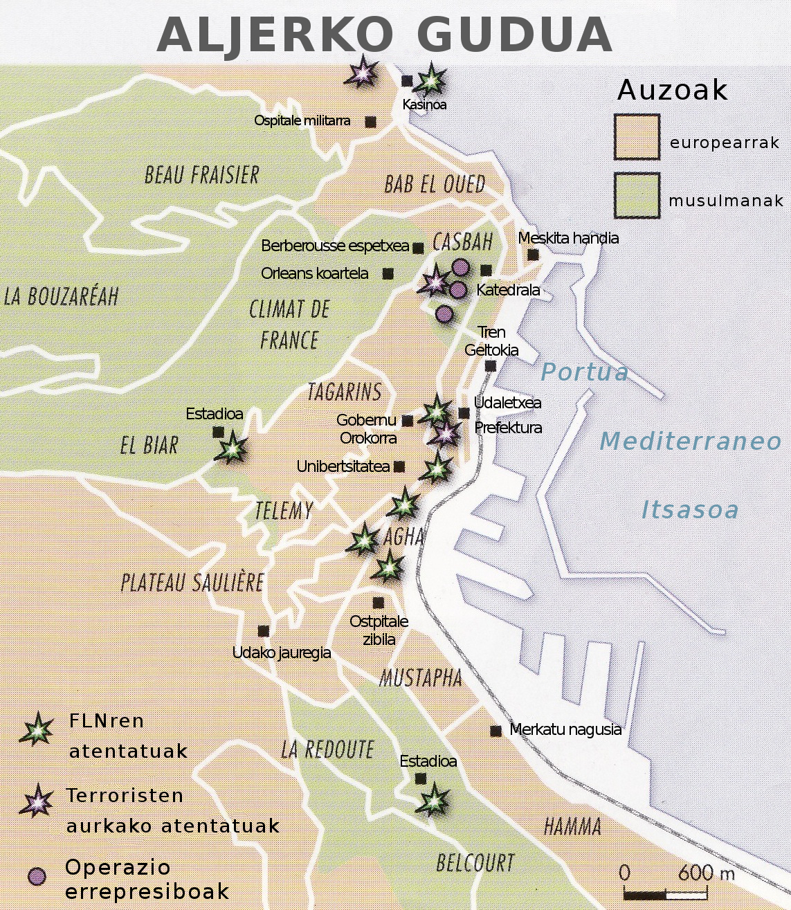 Aljerreko guduari buruzko planoa